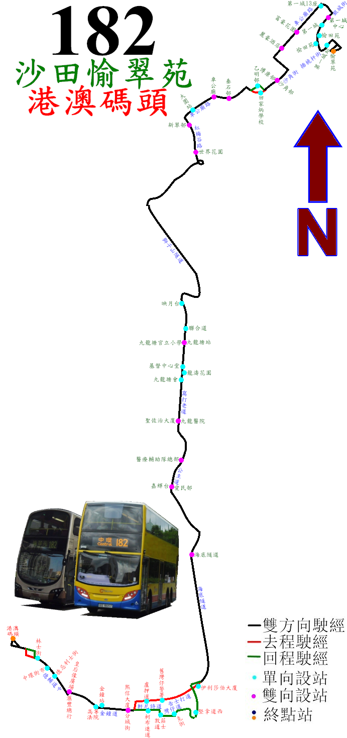 中文（香港）: 過海隧巴182線的走線圖